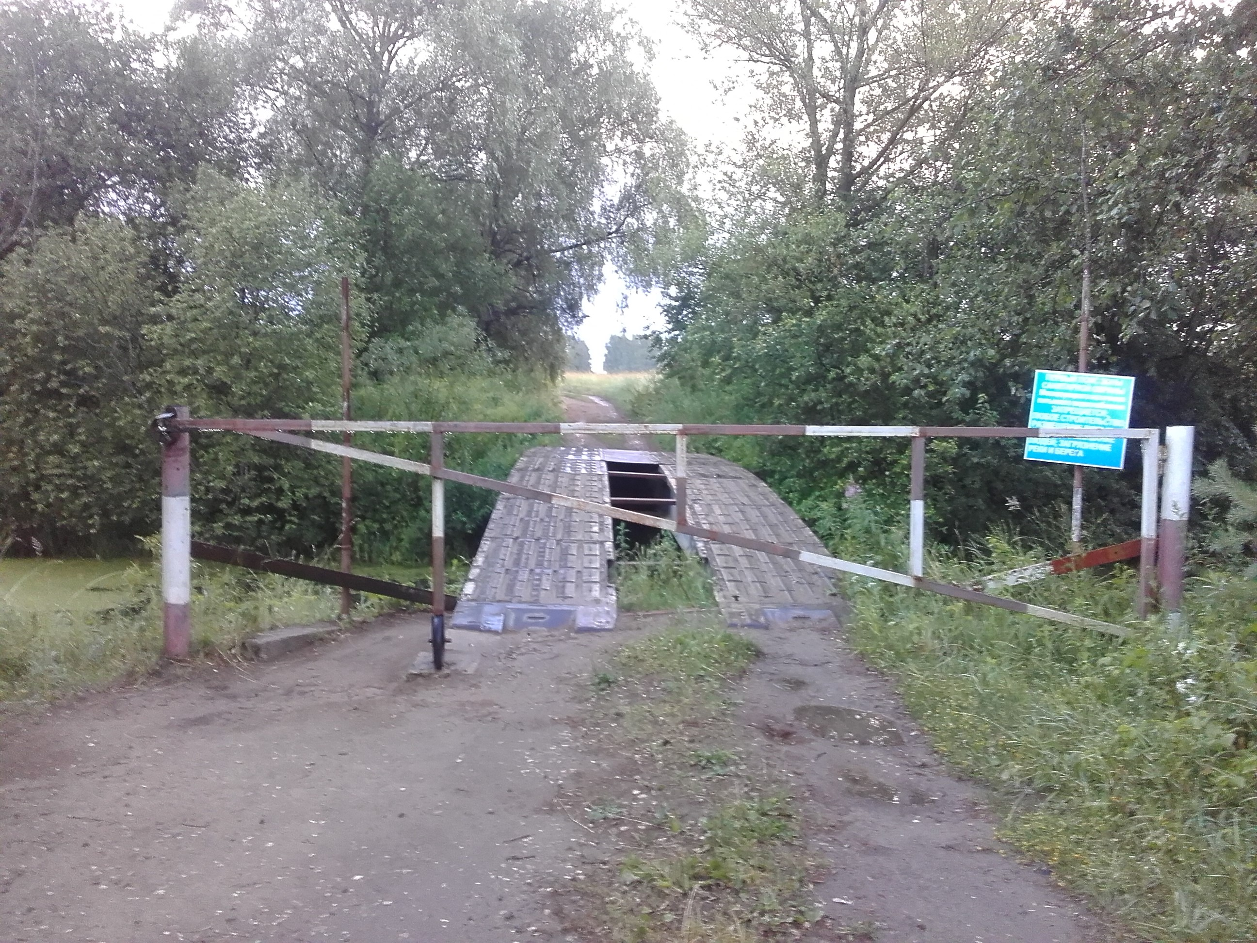 Въезд на Лохин остров со стороны деревни Глухово